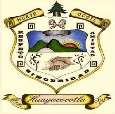 Escudo Oficial de Huayacocotla, Veracruz.